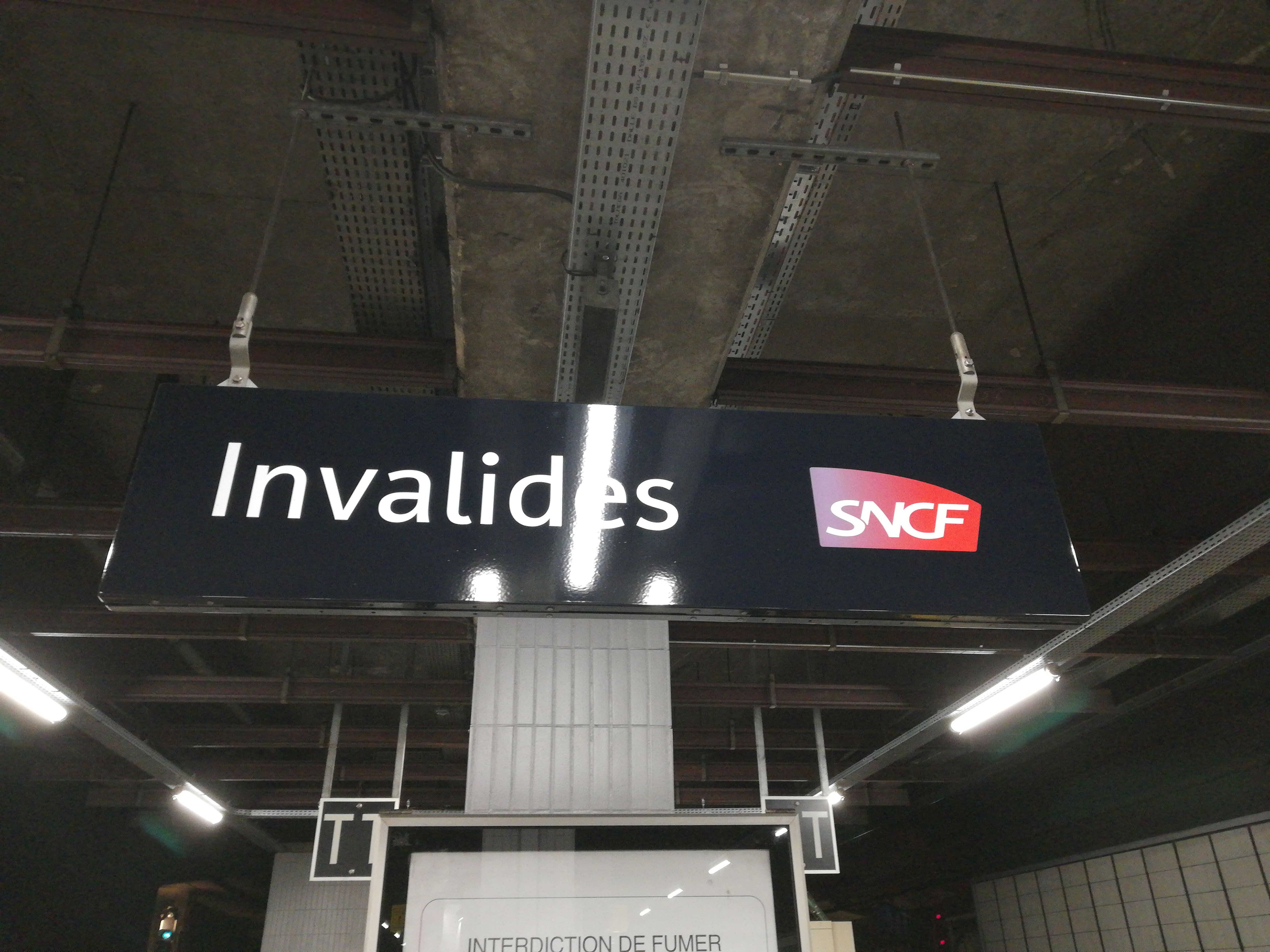 Plaque signalétique de la gare des Invalides, en 2017, à Paris 7e, France.